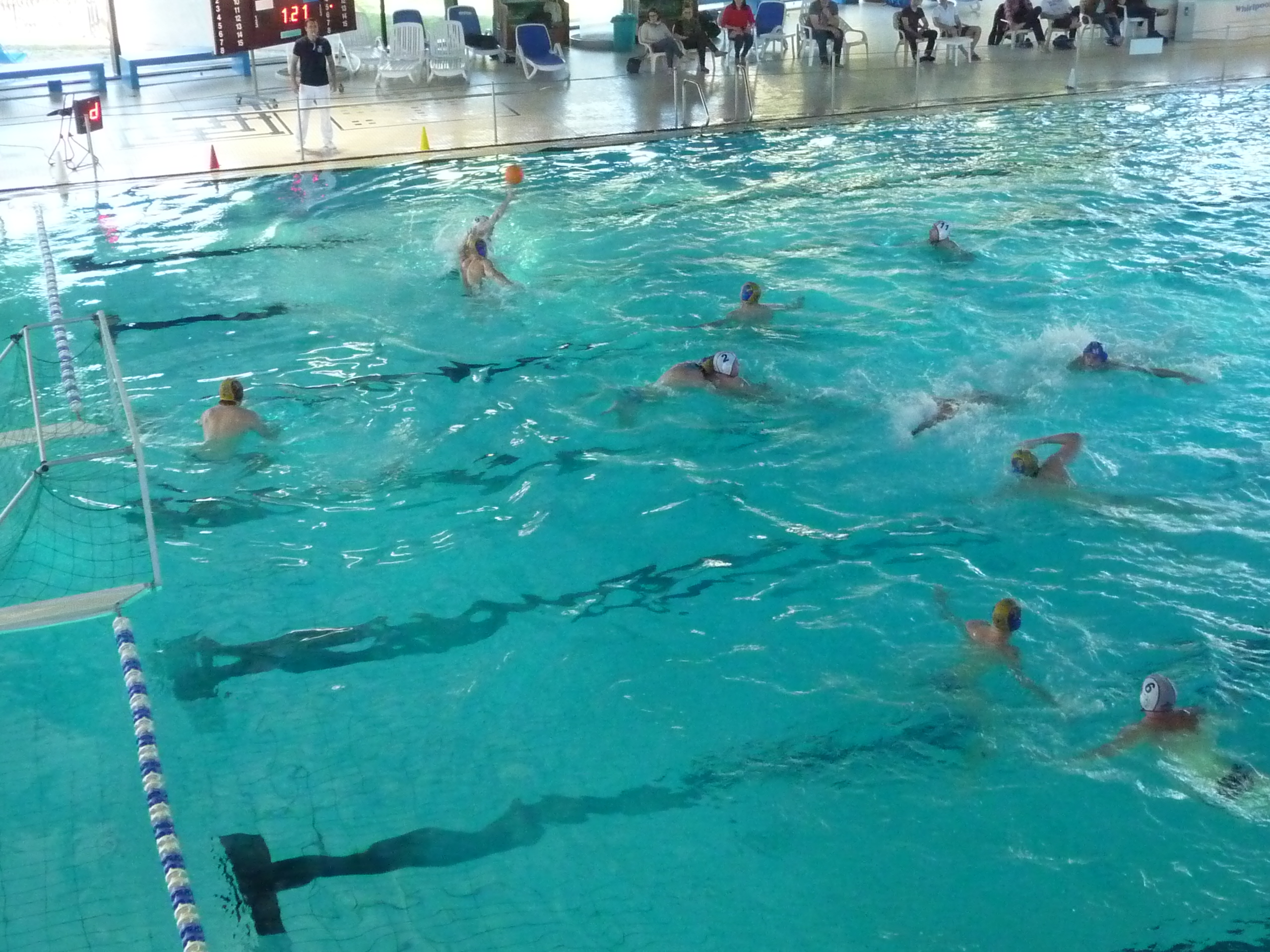 Badezentrum Sindelfingen – Wasserballspiel SV Cannstatt – SVV Plauen